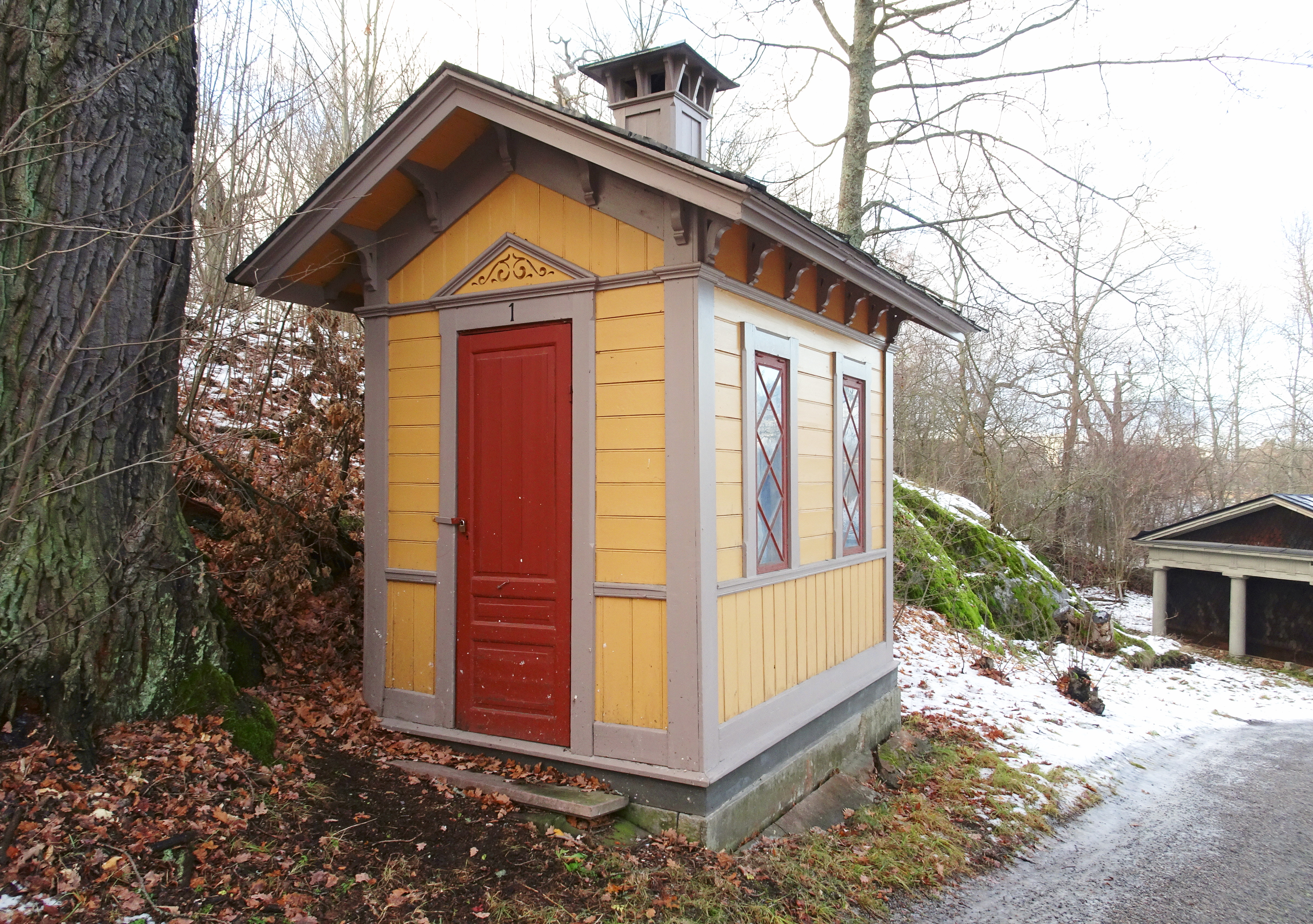 Utedass vid Kavaljersflygeln, Rosendals slott. Dasset är ett statligt byggnadsminne sedan 2006-11-16